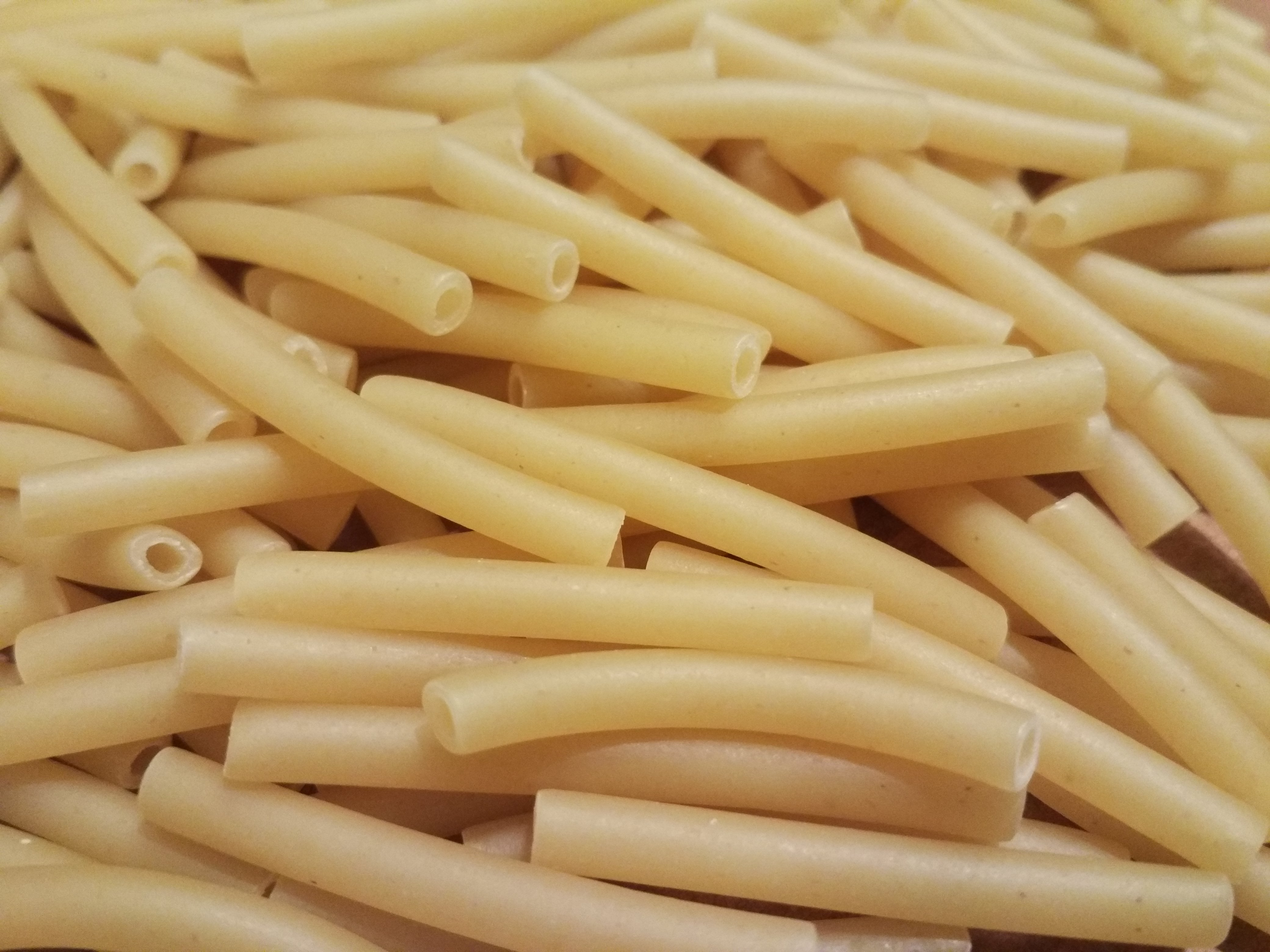 italian macaroni